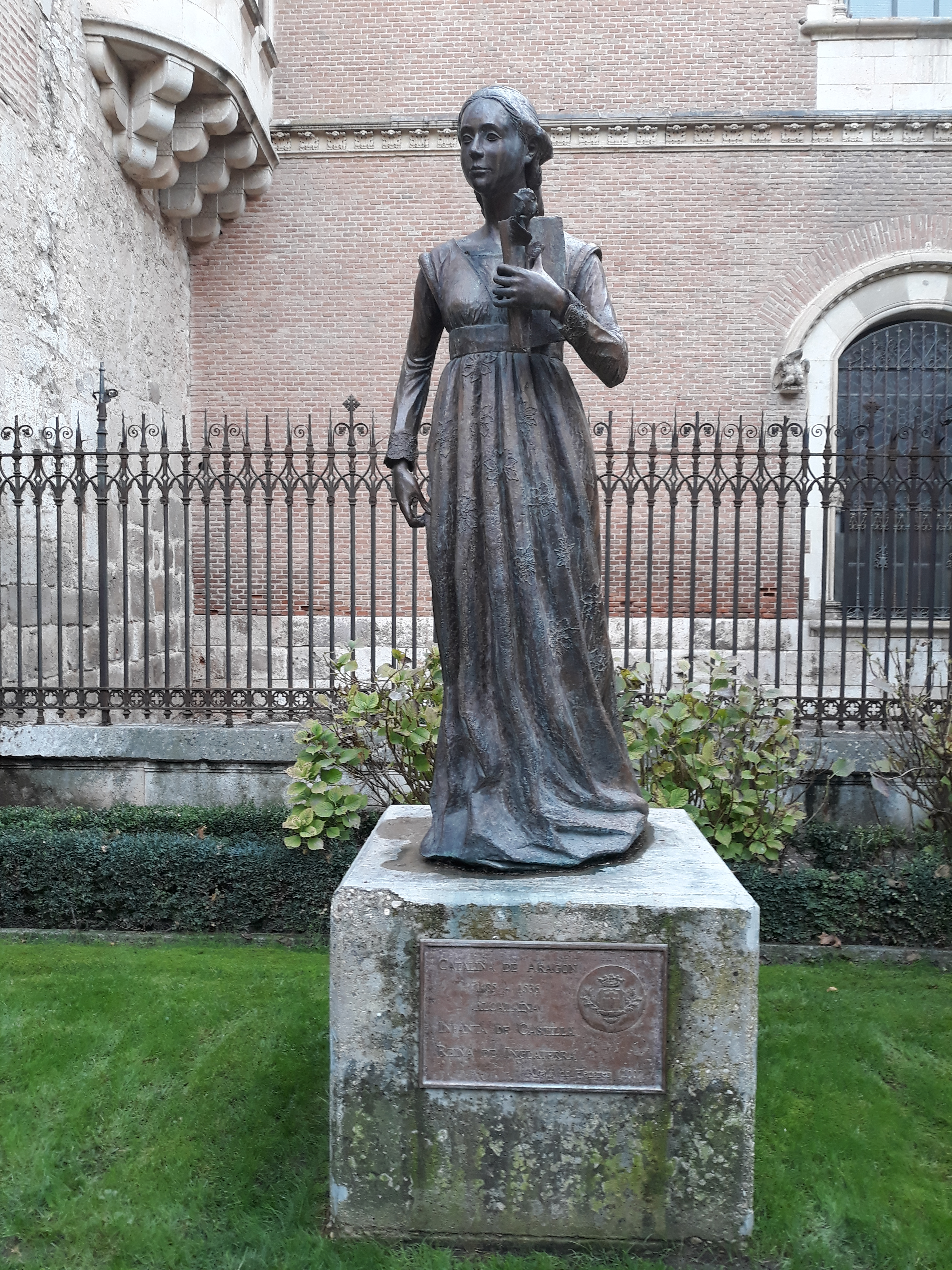 Das Denkmal der späteren englischen Königin und ersten Ehefrau Heinrichs VIII. in ihrem Geburtsort Alcala de Henares (Neukastillien) in Spanien.